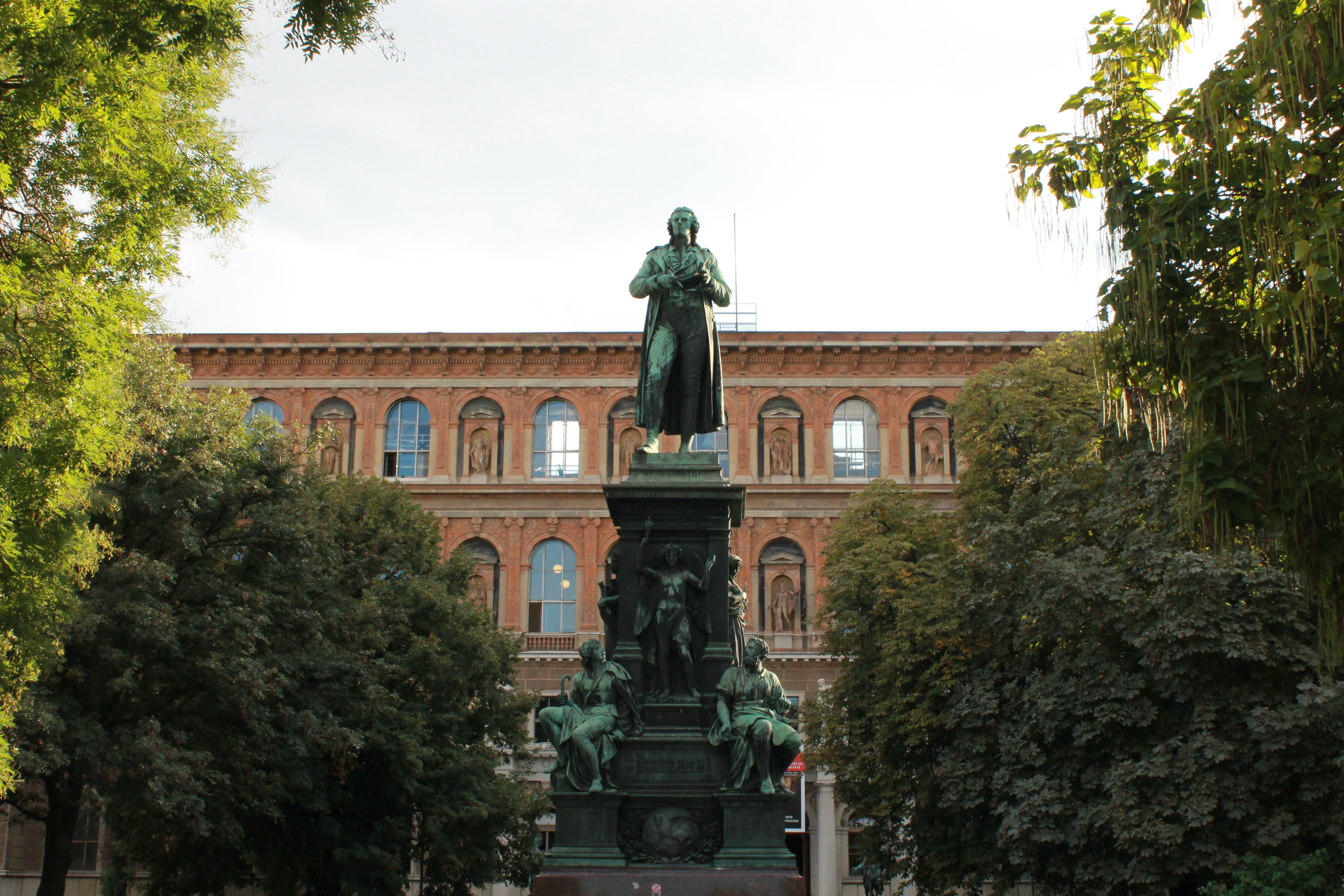 Friedrich von Schiller-Denkmal